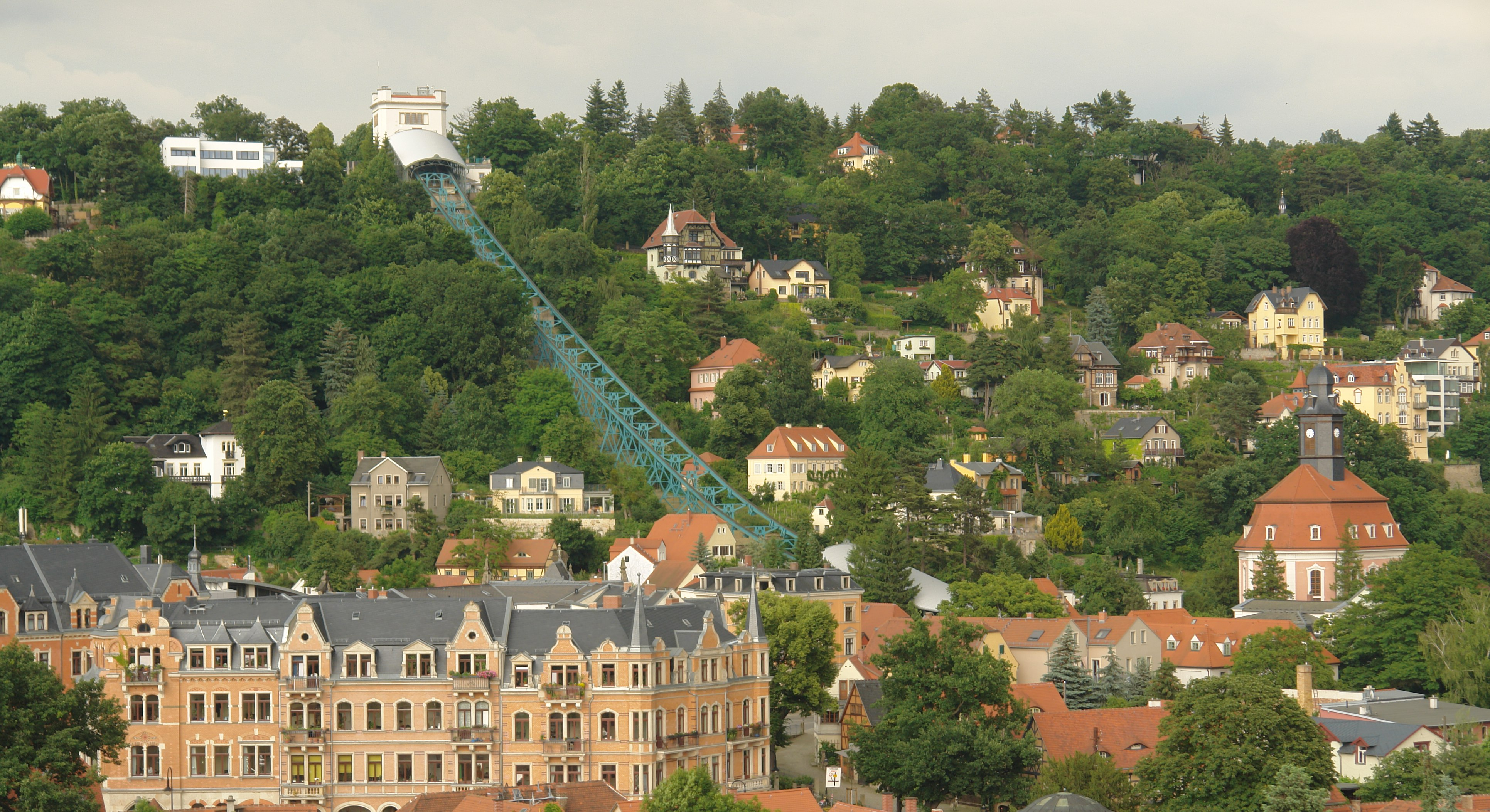 Blick auf die Schwebebahn Dresden und die Loschwitzer Kirche